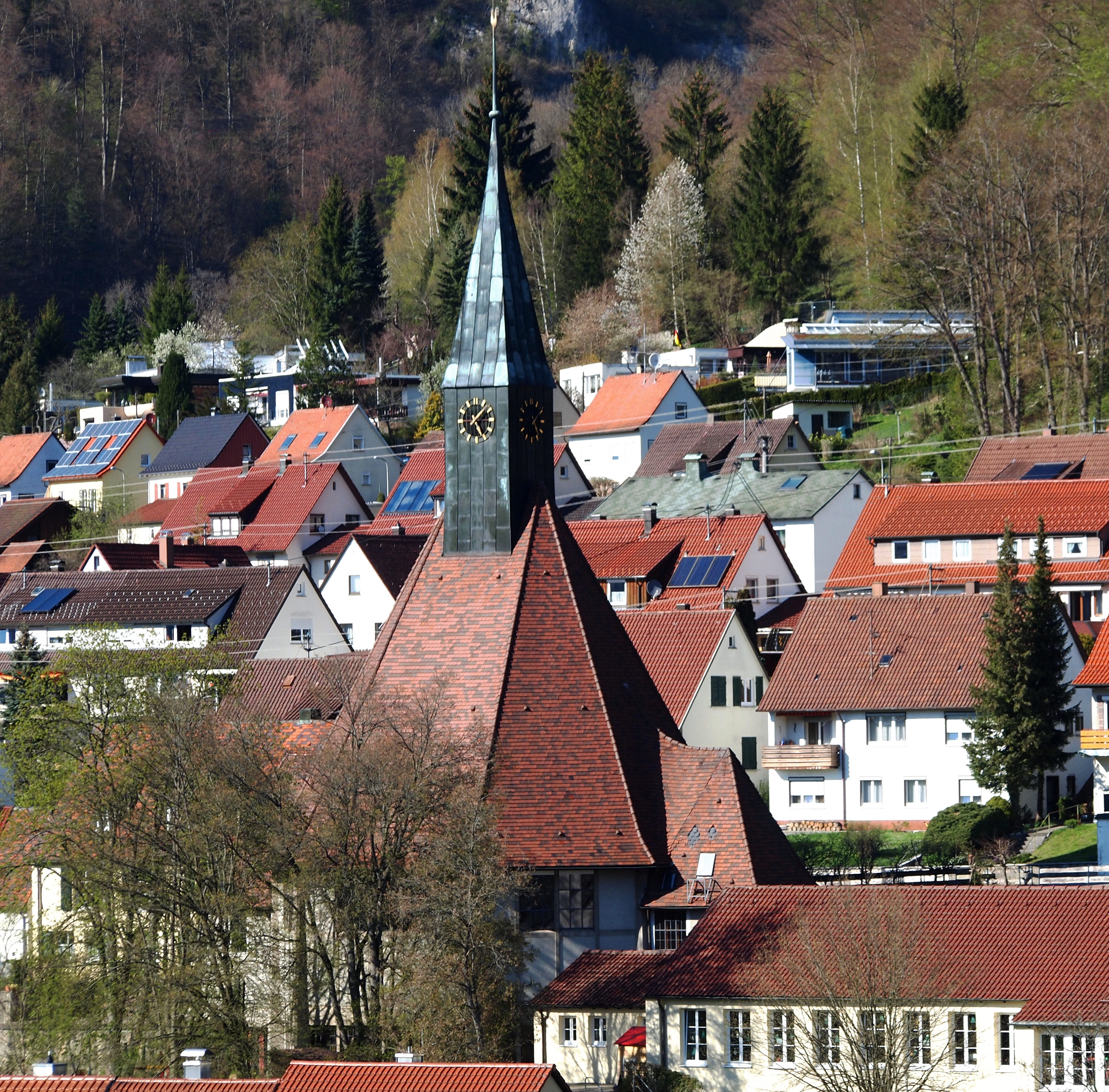 Thomaskirche in Ebingen (evangelisch, Oststadt)